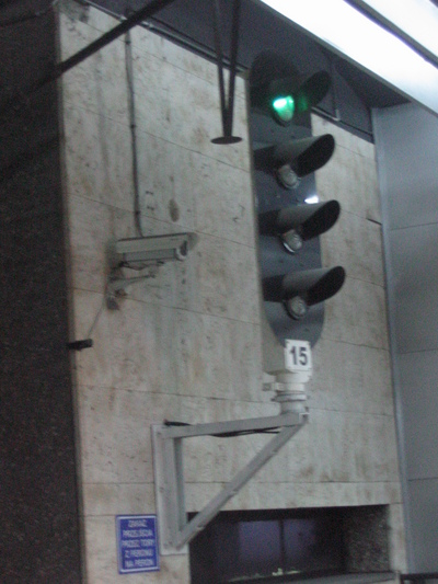 4-komorowy semafor SBL (z możliwością podawania sygnału S1a) na przystanku osobowym Warszawa Śródmieście (w stronę W-wy Powiśla)